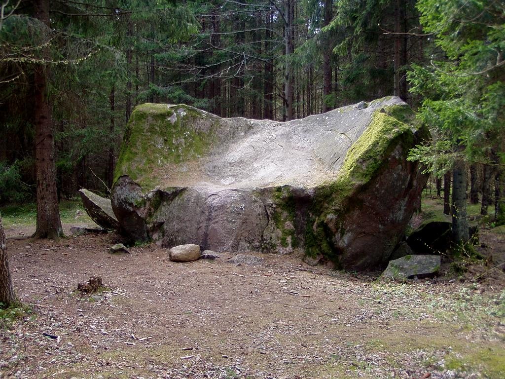 Grīžu Velna beņķis 2007-04-30